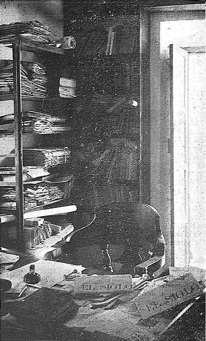 Gabinete escritorio de Adolfo Claravana